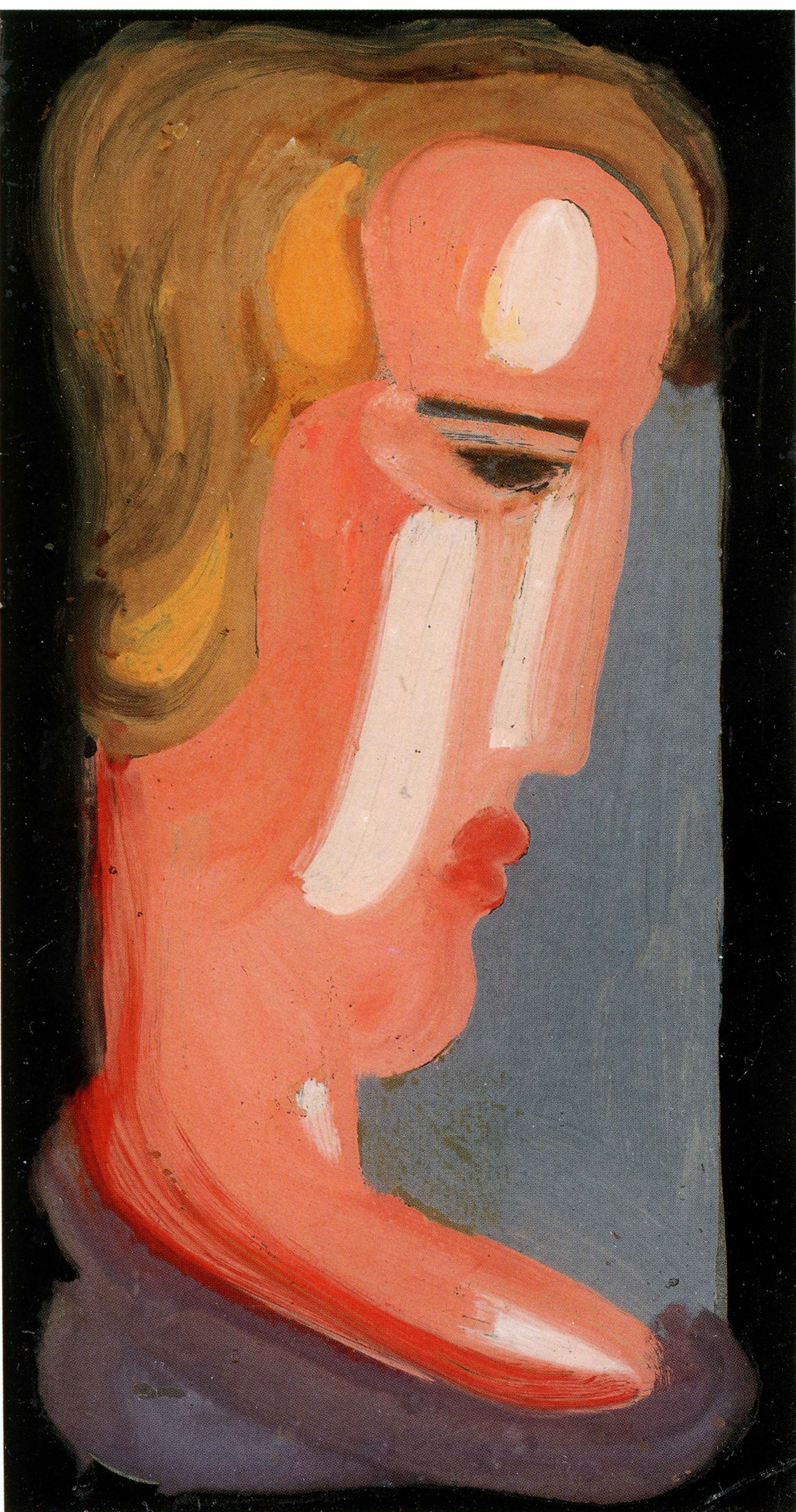 Geneigter Kopf, Öl hinter Glas von Oskar Schlemmer